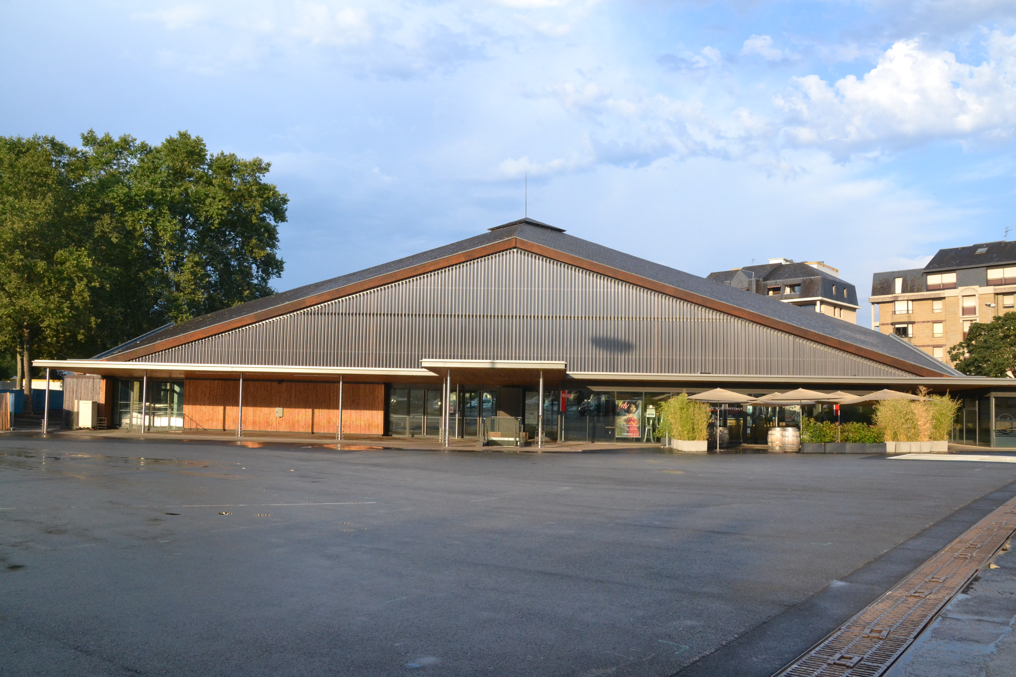 La halle Georges-Brassens de Brive-la-Gaillarde (Corrèze, France).